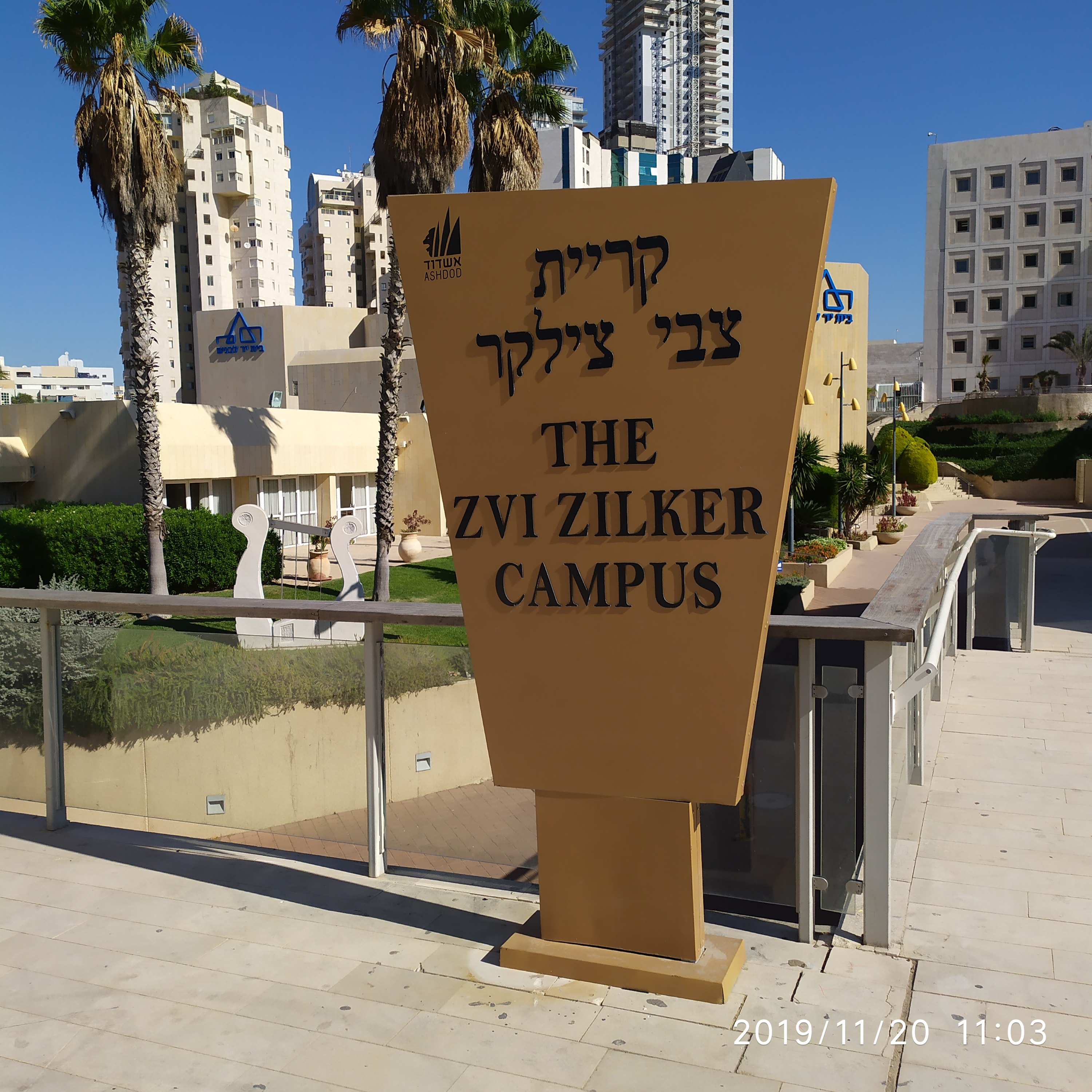 קריית תרבות על שמו של צבי צילקר